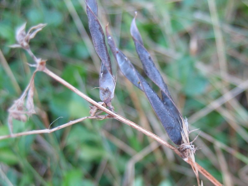 reife Hülse von Vicia sativa ssp. nigra